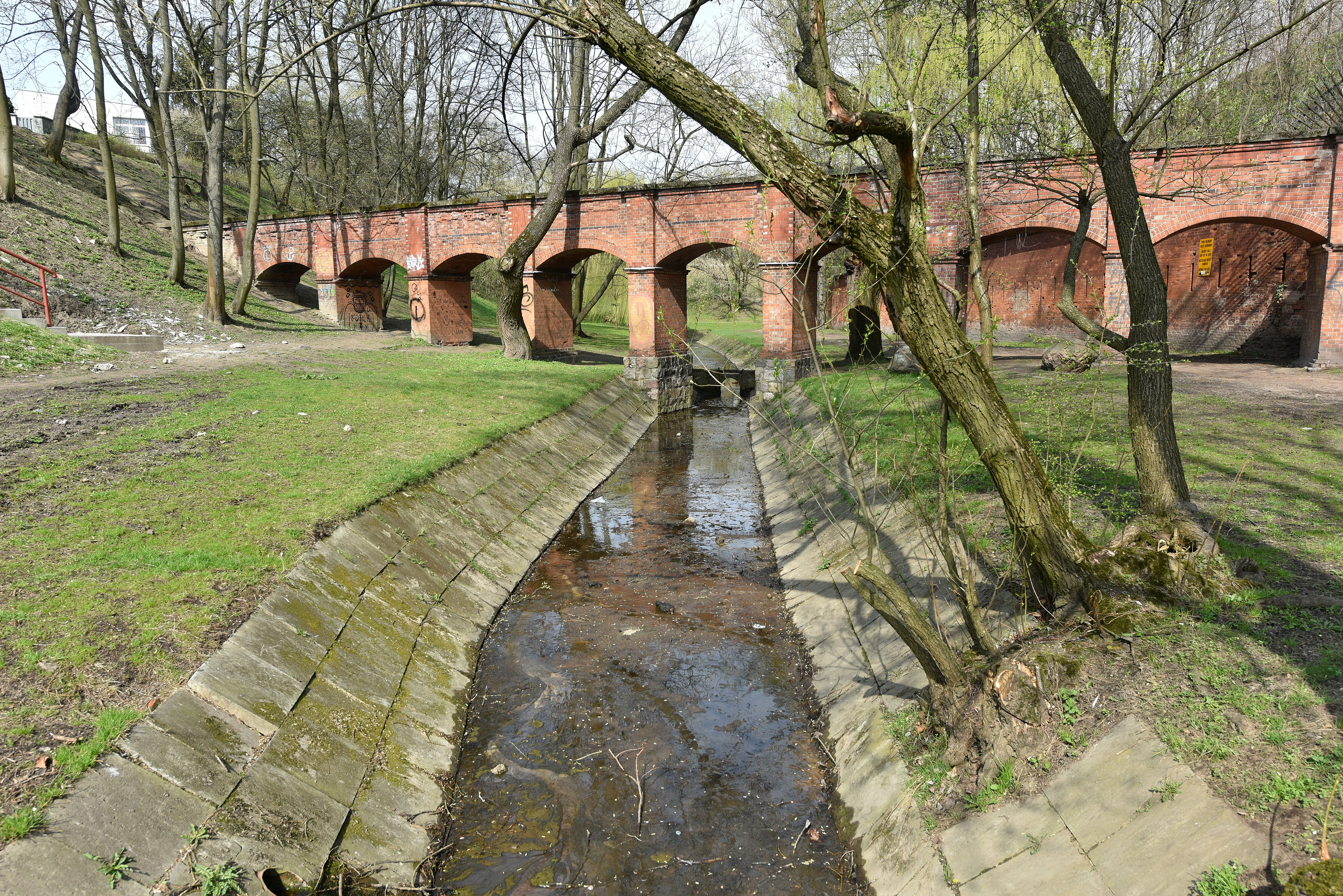 Cytadela Warszawska. Rzeka Drna